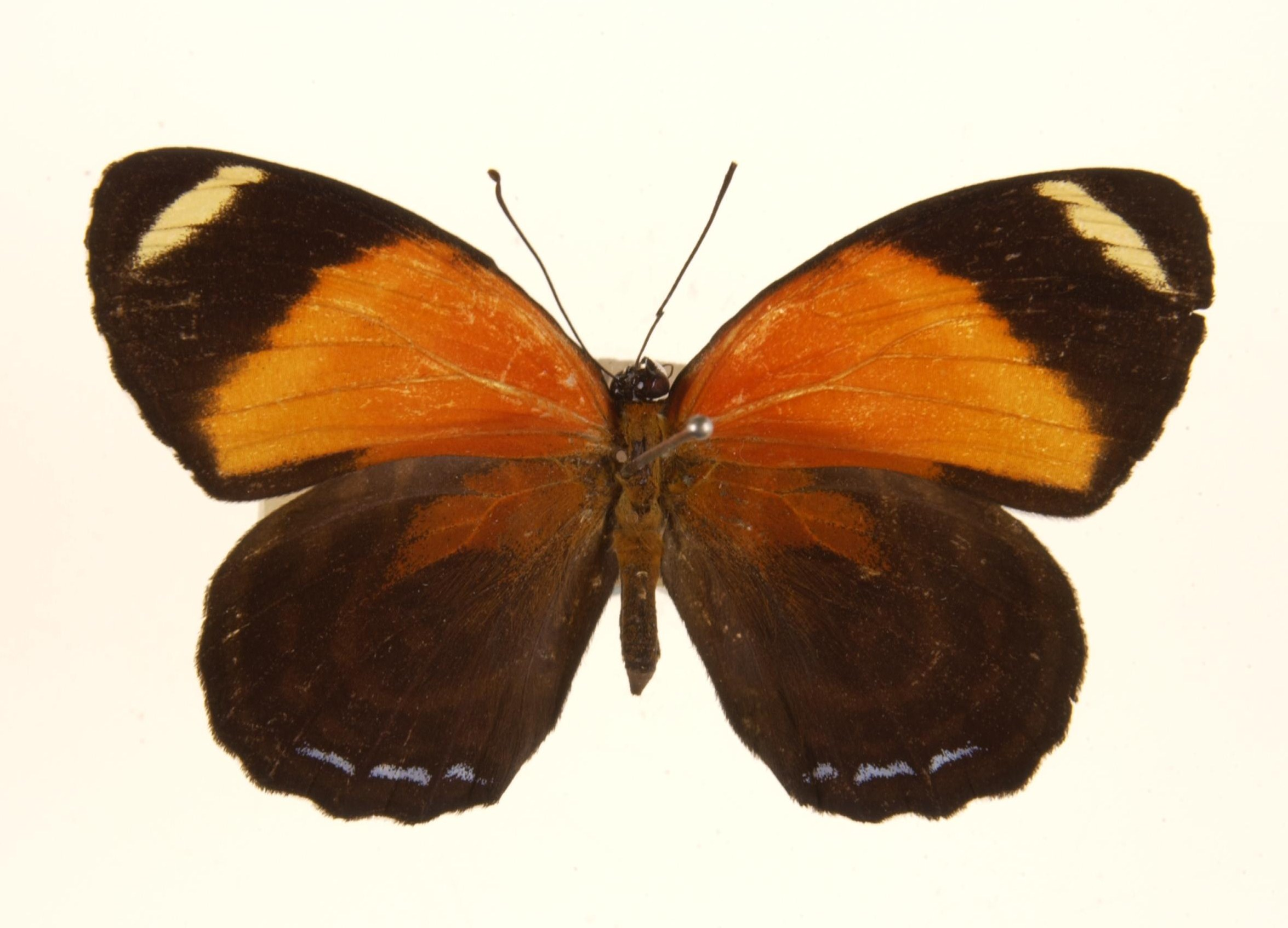 Callicore astarte